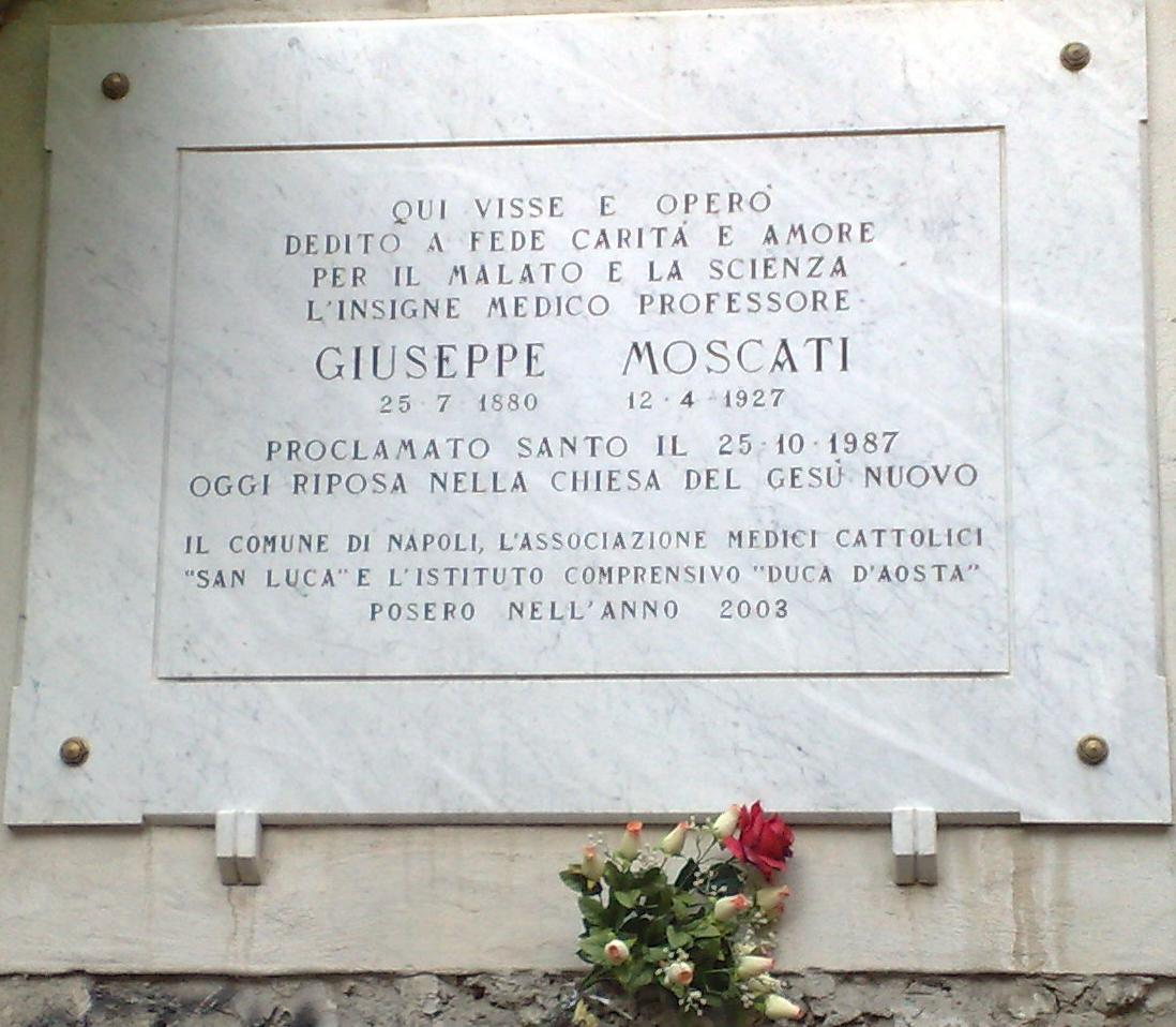 Targa in memoria di Giuseppe Moscati affissa sul palazzo a Napoli in cui è vissuto.